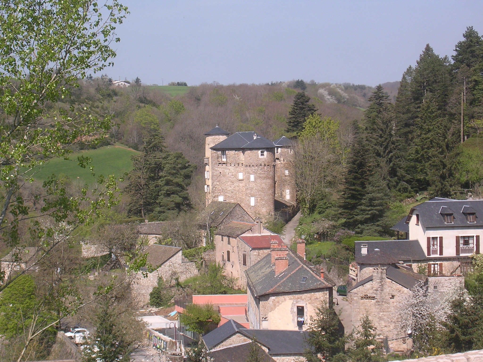 village de Saint-Léon (Aveyron)